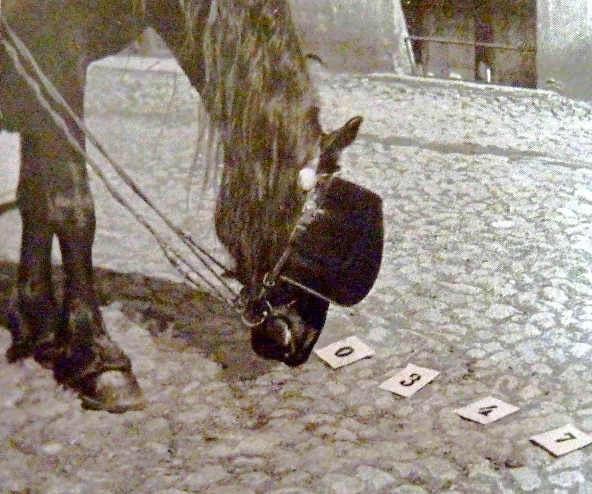 der kluge Hans zeigt mit der Nase auf die gewünschte Ziffer